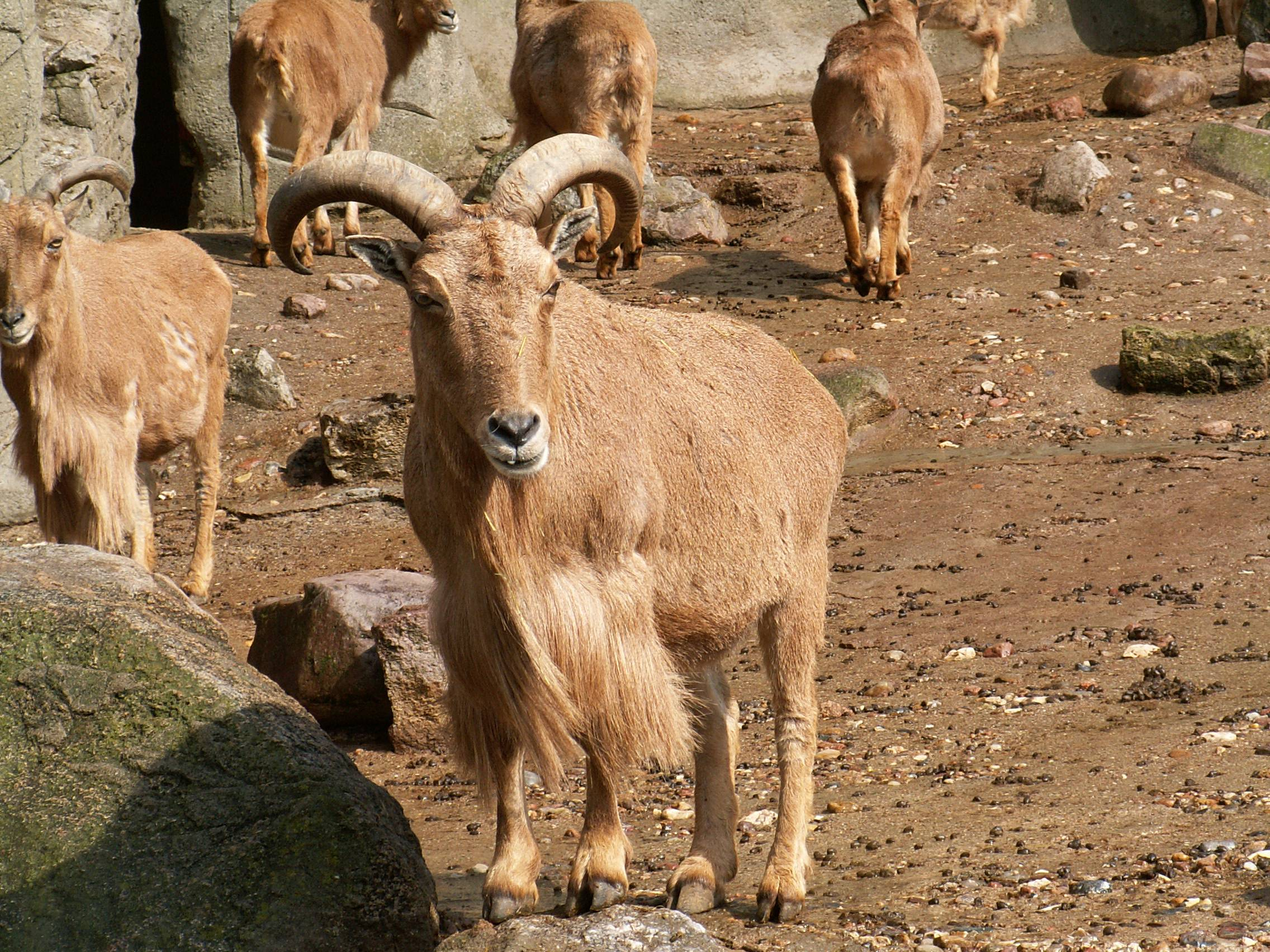 Mähnenspringer (Ammotragus lervia) in Hagenbecks Tierpark, Hamburg, Deutschland